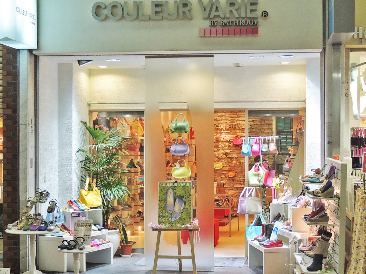 クロールバリエ 神戸元町店（神戸元町1番街サイト）（神戸市中央区元町通2）